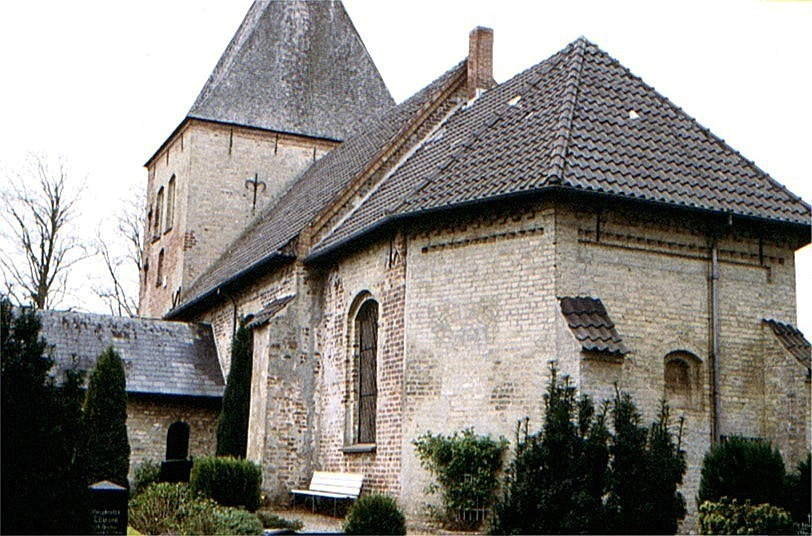 Hürup Kirke i Sydslesvig. Hürup kirke